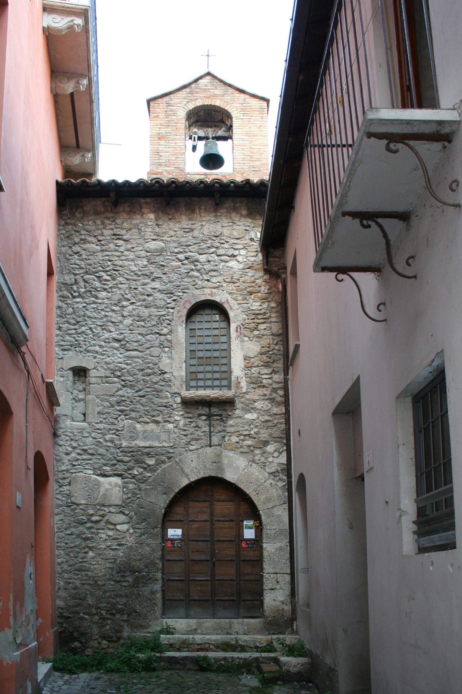 Chiesa di Santa Caterina a Teramo - prospetto